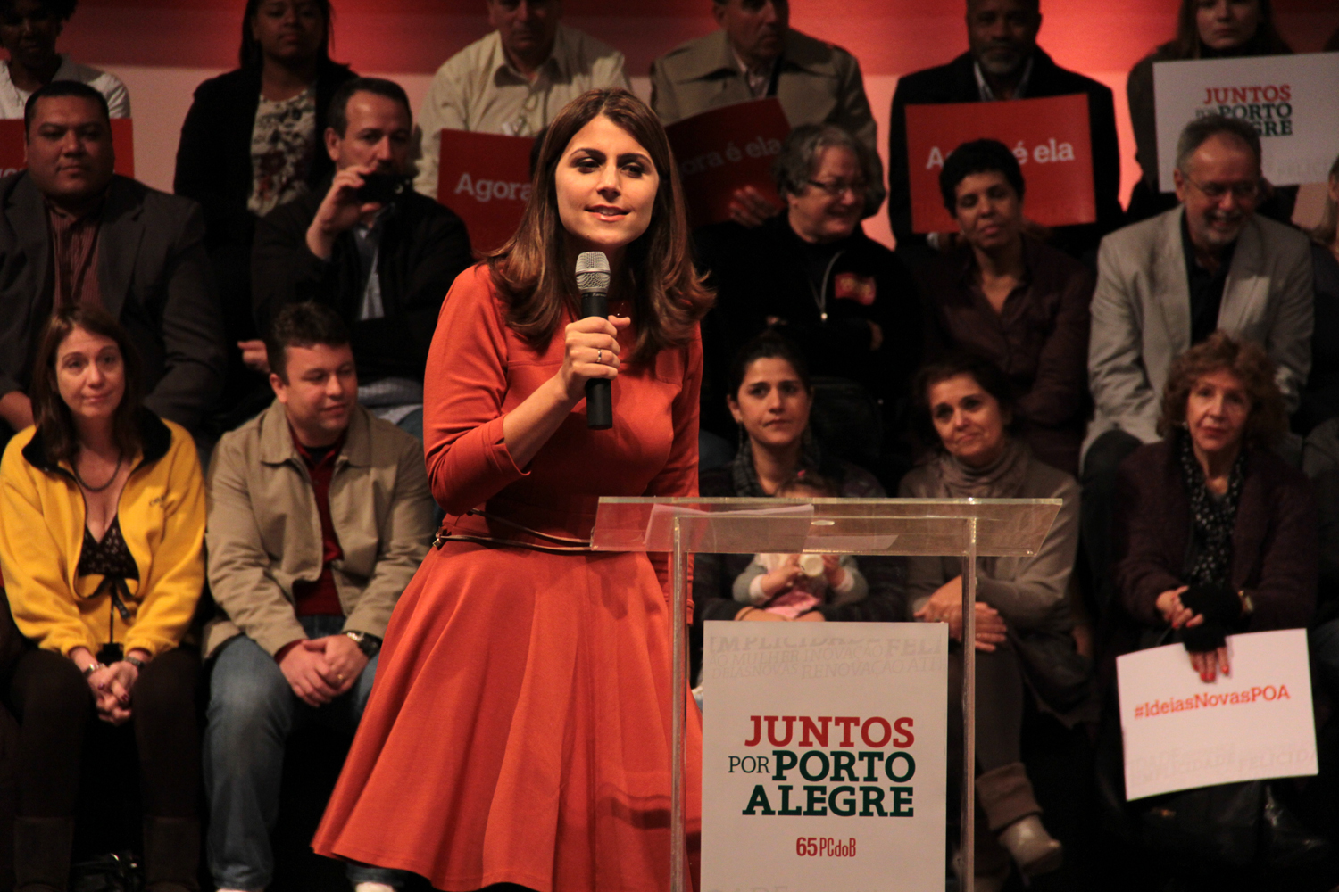 Manuela d'Ávila na Convenção do PCdoB em 2012